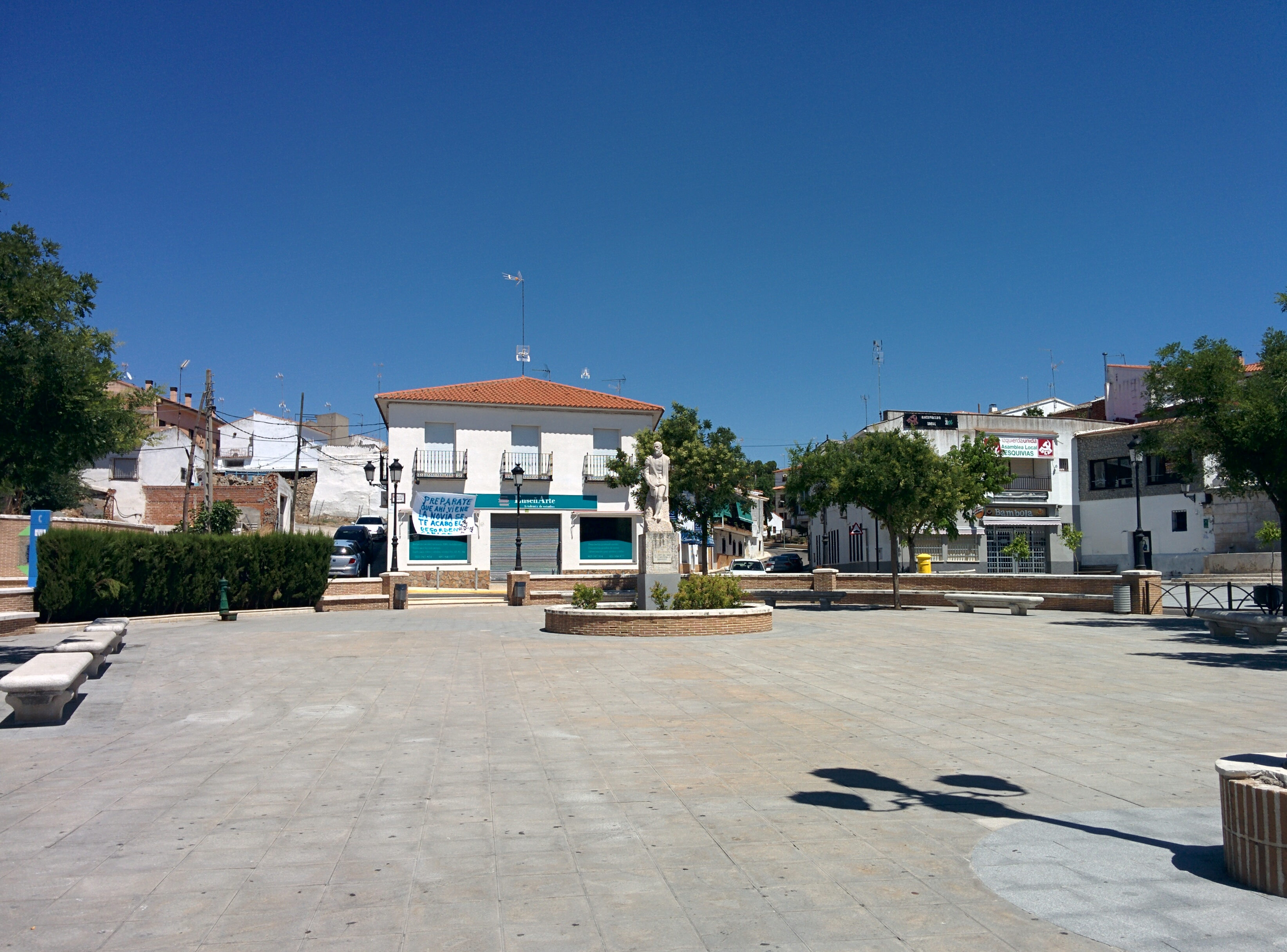 Plaza Mayor de Esquivias (Toledo, España).